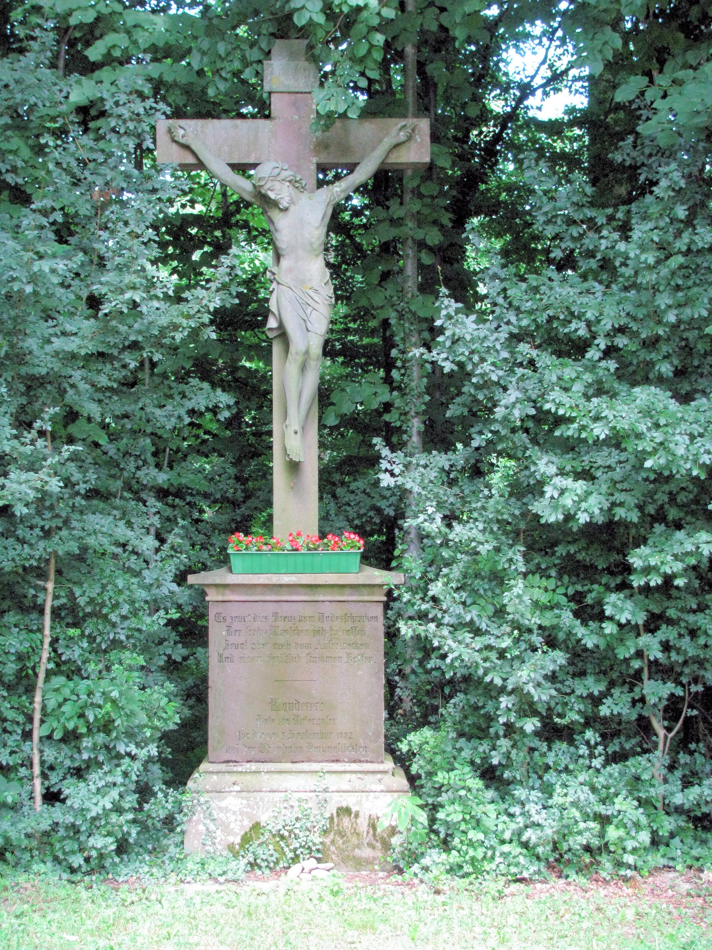 Gedenkkreuz gegenüber dem Tierhygienischen Institut an der Straße nach Hugstetten das an das Unglück vom 03.09 1882 erinnert